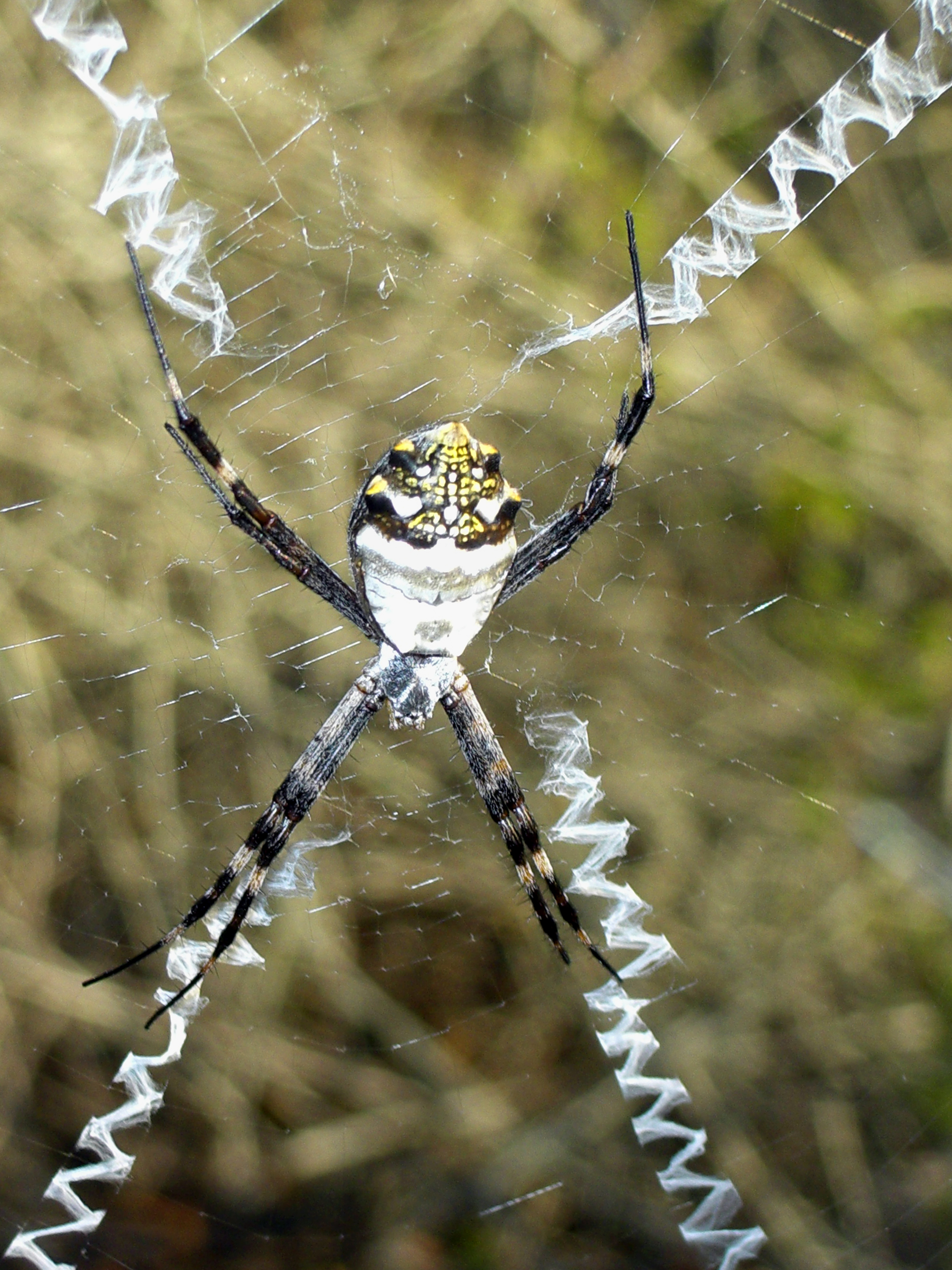 Silver Argiope - Argiope argentata - Galapagos 2006